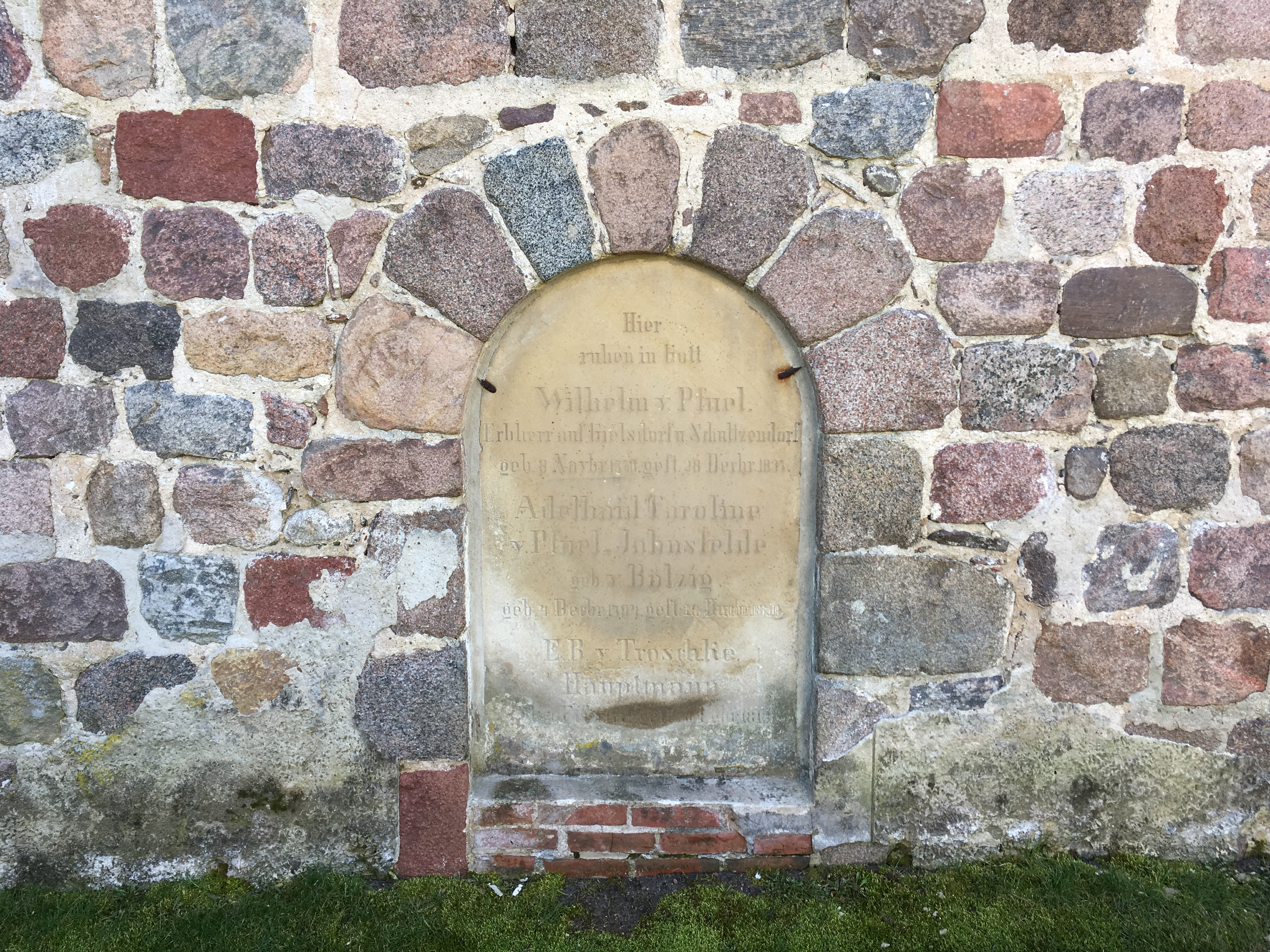 Die Dorfkirche Gielsdorf ist eine Feldsteinkirche aus dem 13. Jahrhundert in Gielsdorf, einem Ortsteil der Stadt Altlandsberg im Landkreis Märkisch-Oderland in Brandenburg. Im Innern steht unter anderem ein Altarretabel aus der Zeit um 1500.